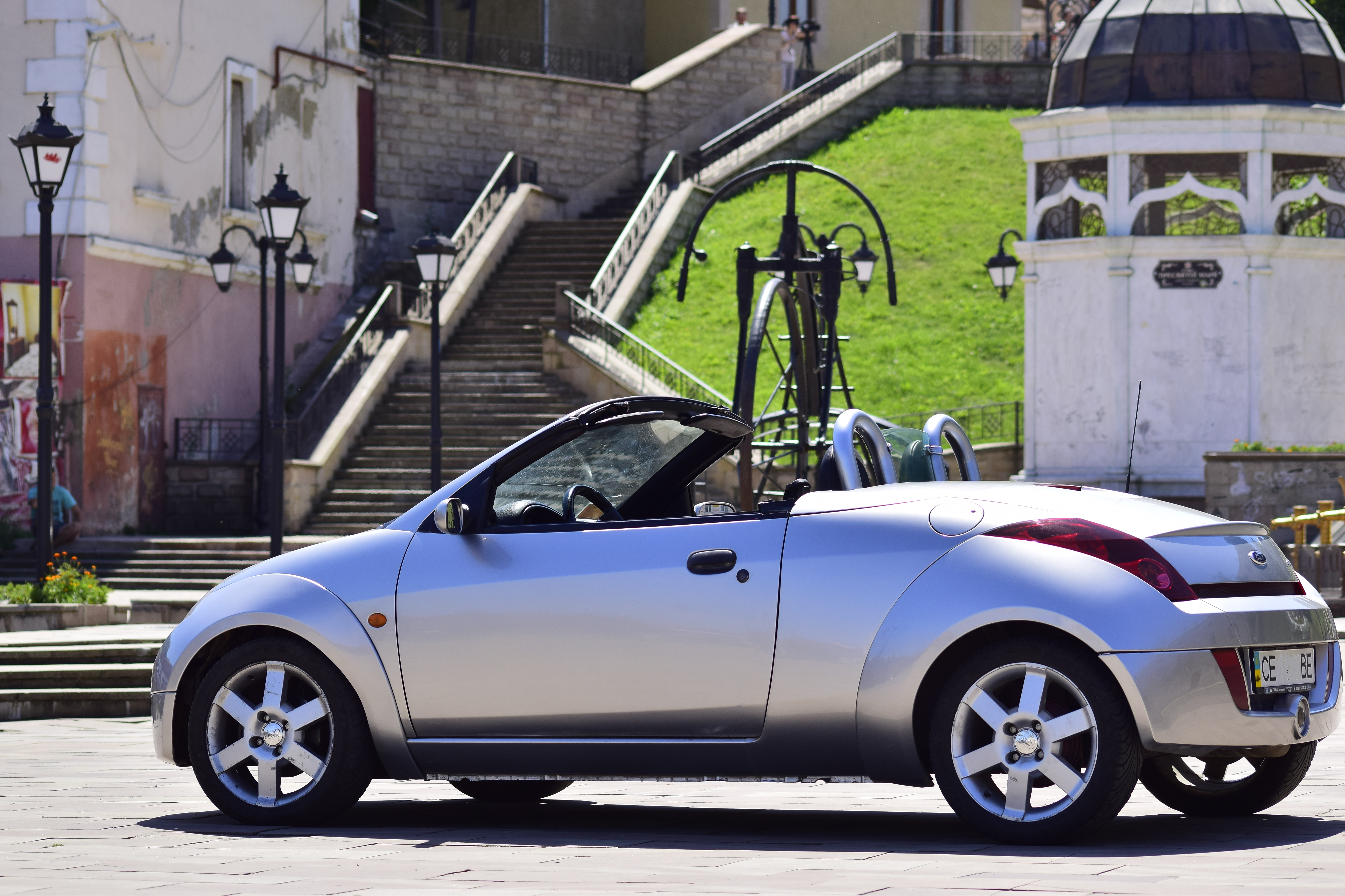 streetka